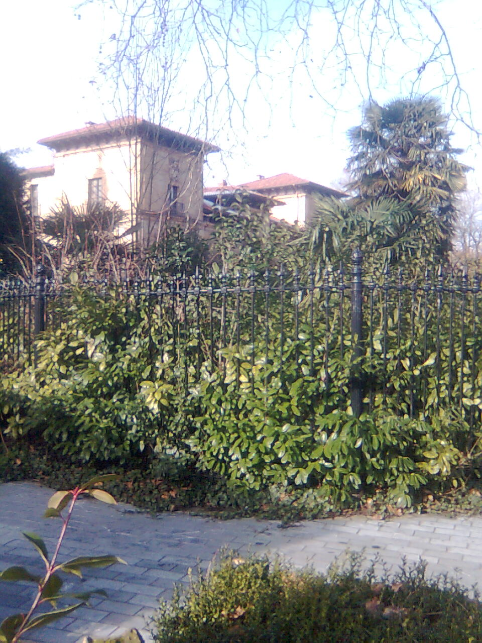 Lazkao jauregiaren irudia (eu)